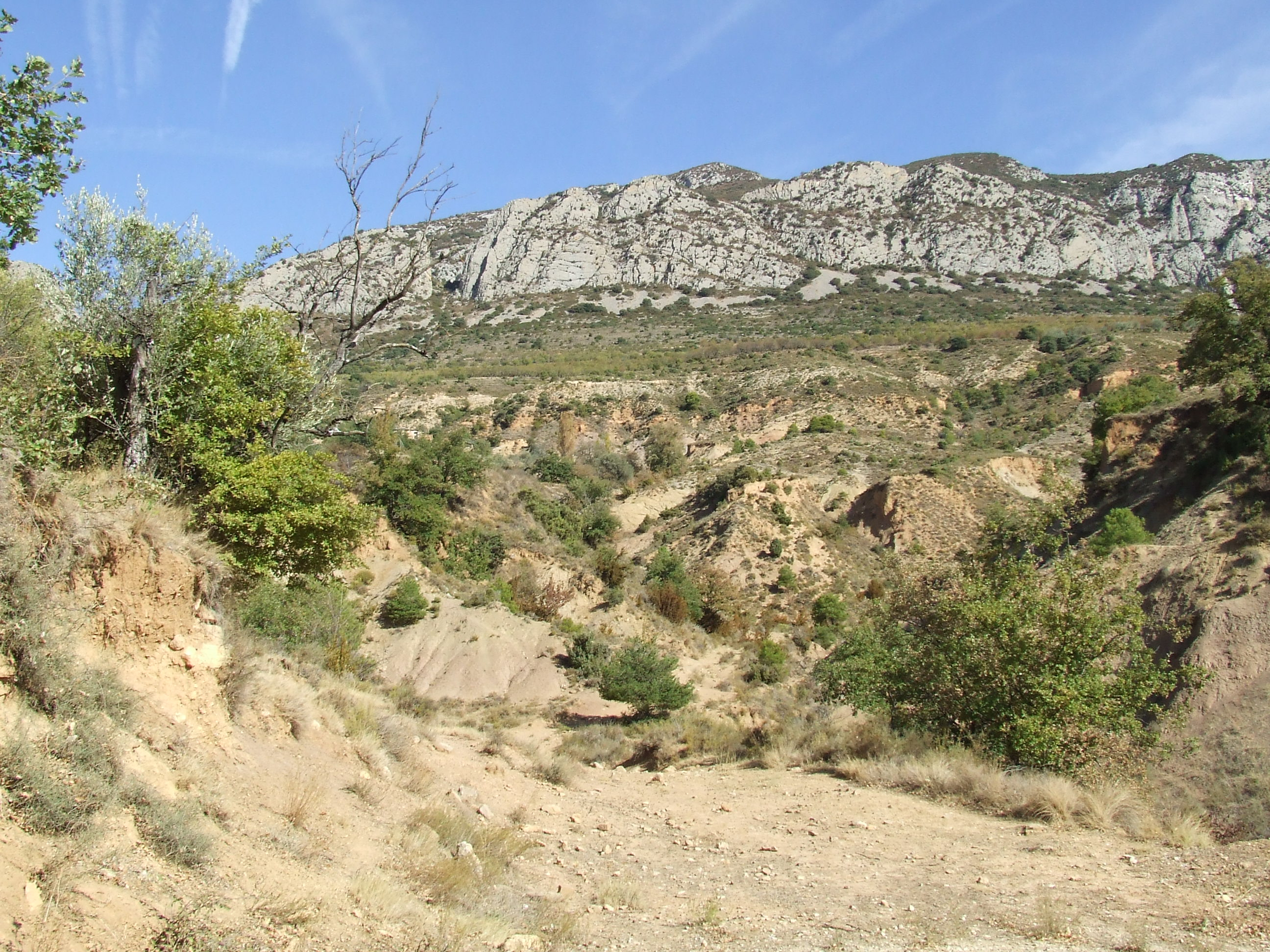 La Llau de les Llongues (Abella de la Conca, Pallars Jussà)